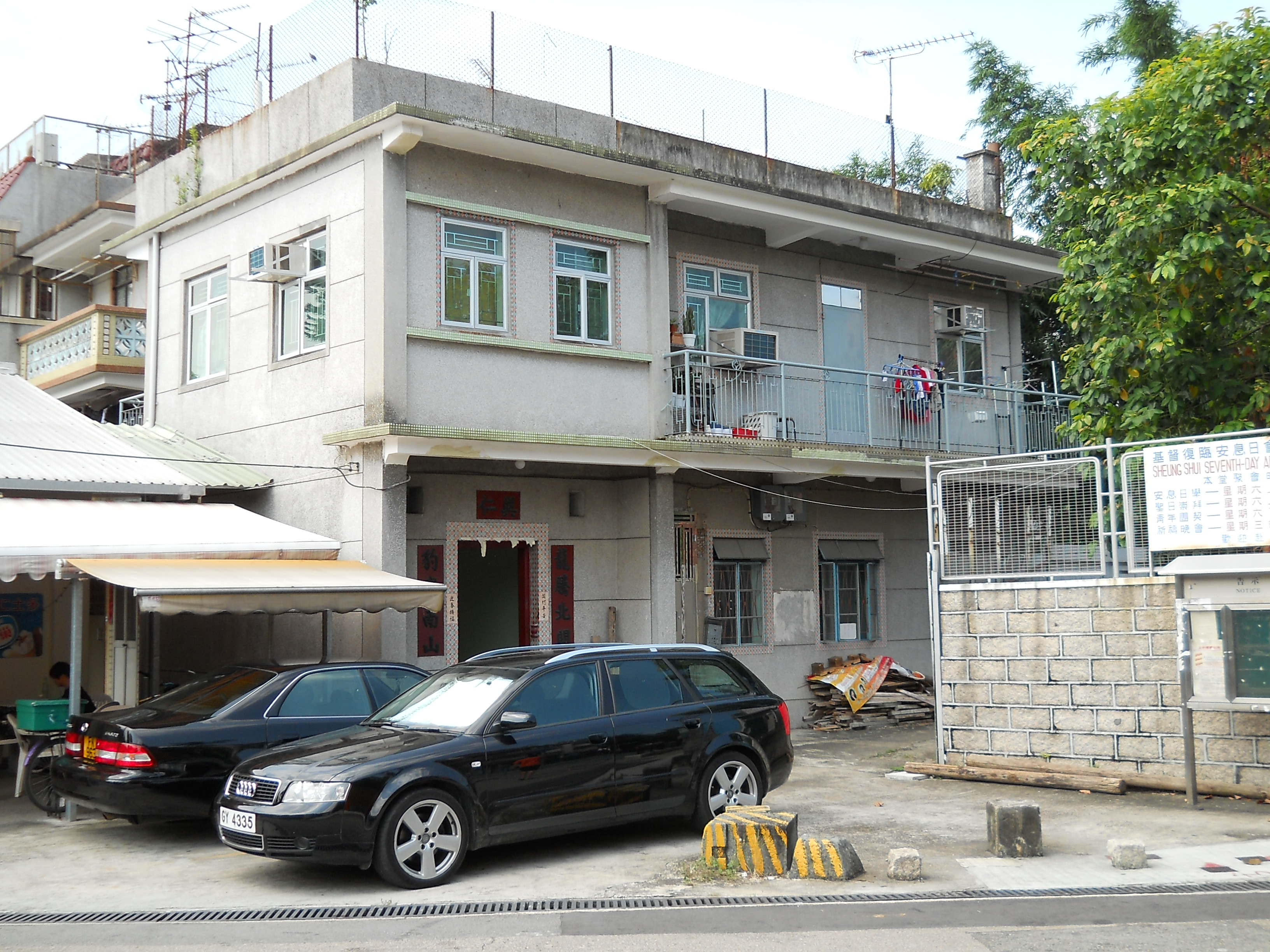 中文（香港）: 上水圍興仁村